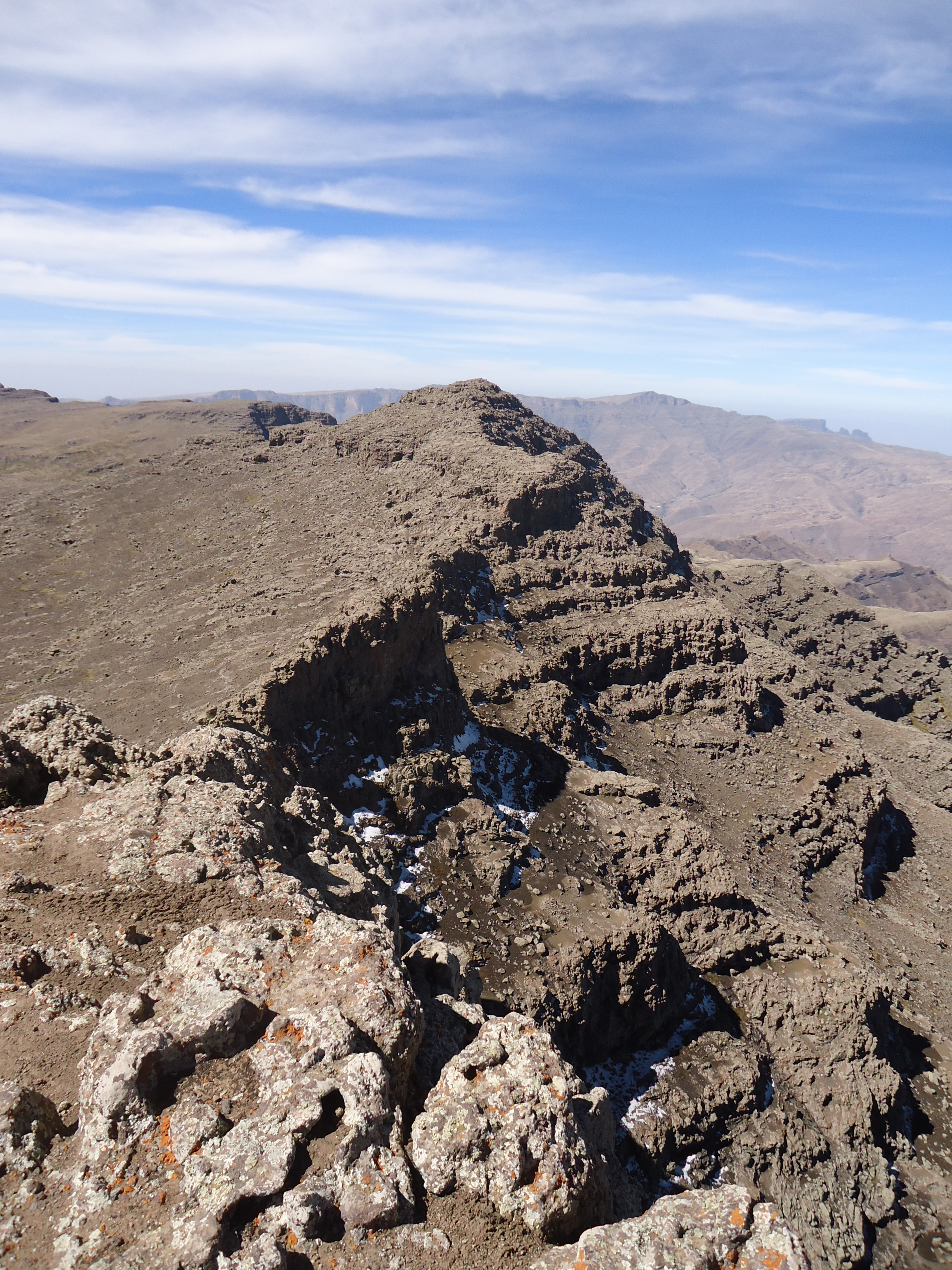 Westgipfel des Ras Dejen am 15.1.2013 mit geringfügigen Schneeresten.